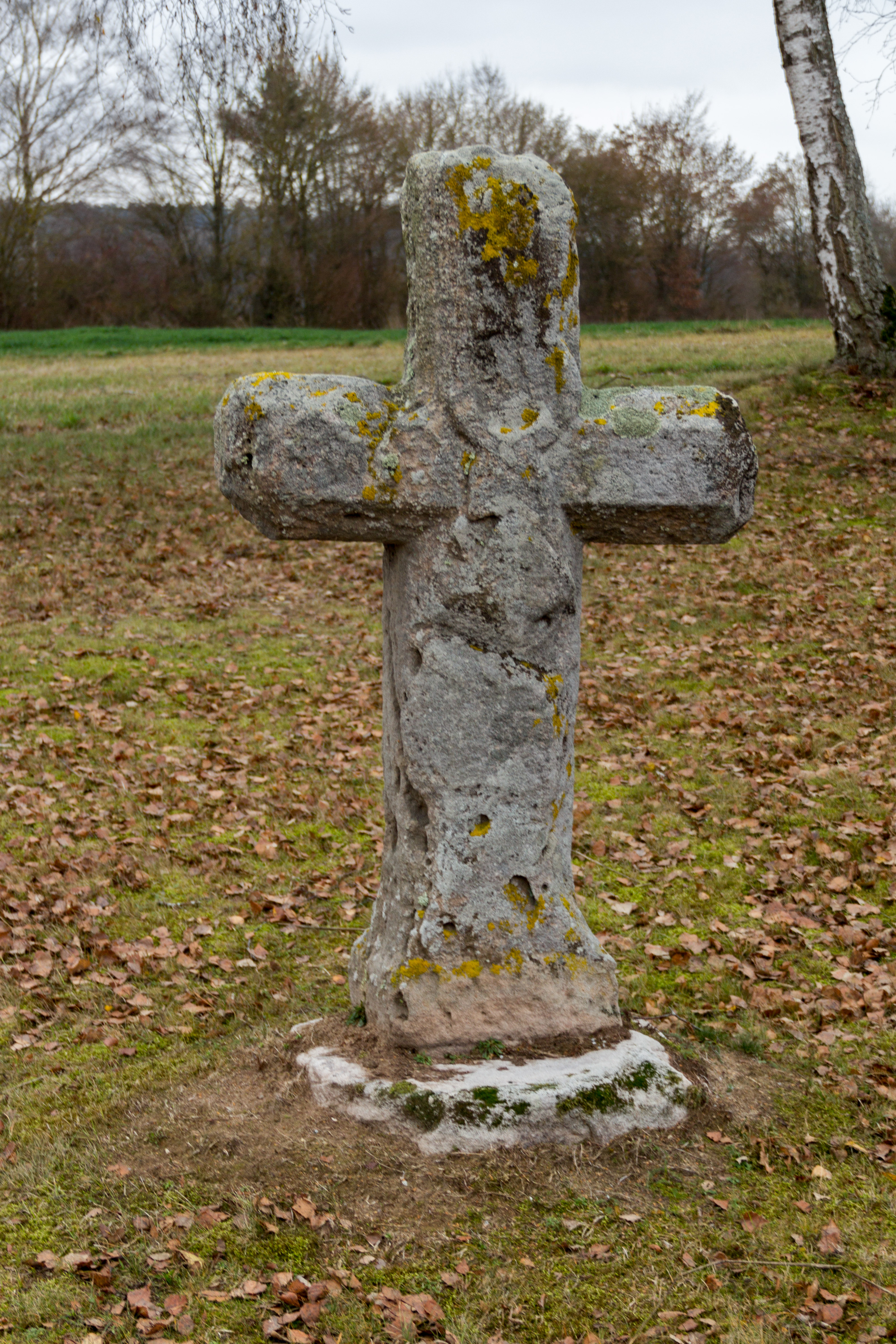 Steinkreuz, Burk, Baudenkmal